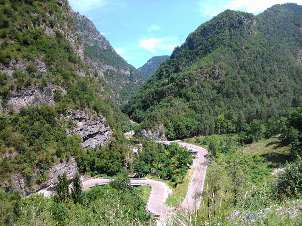 ex forte d'Ampola a Storo in provincia di Trento